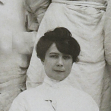 Jeanne Débat-Ponsan, interne des hôpitaux de paris, 1907, hôpital des enfants malades.